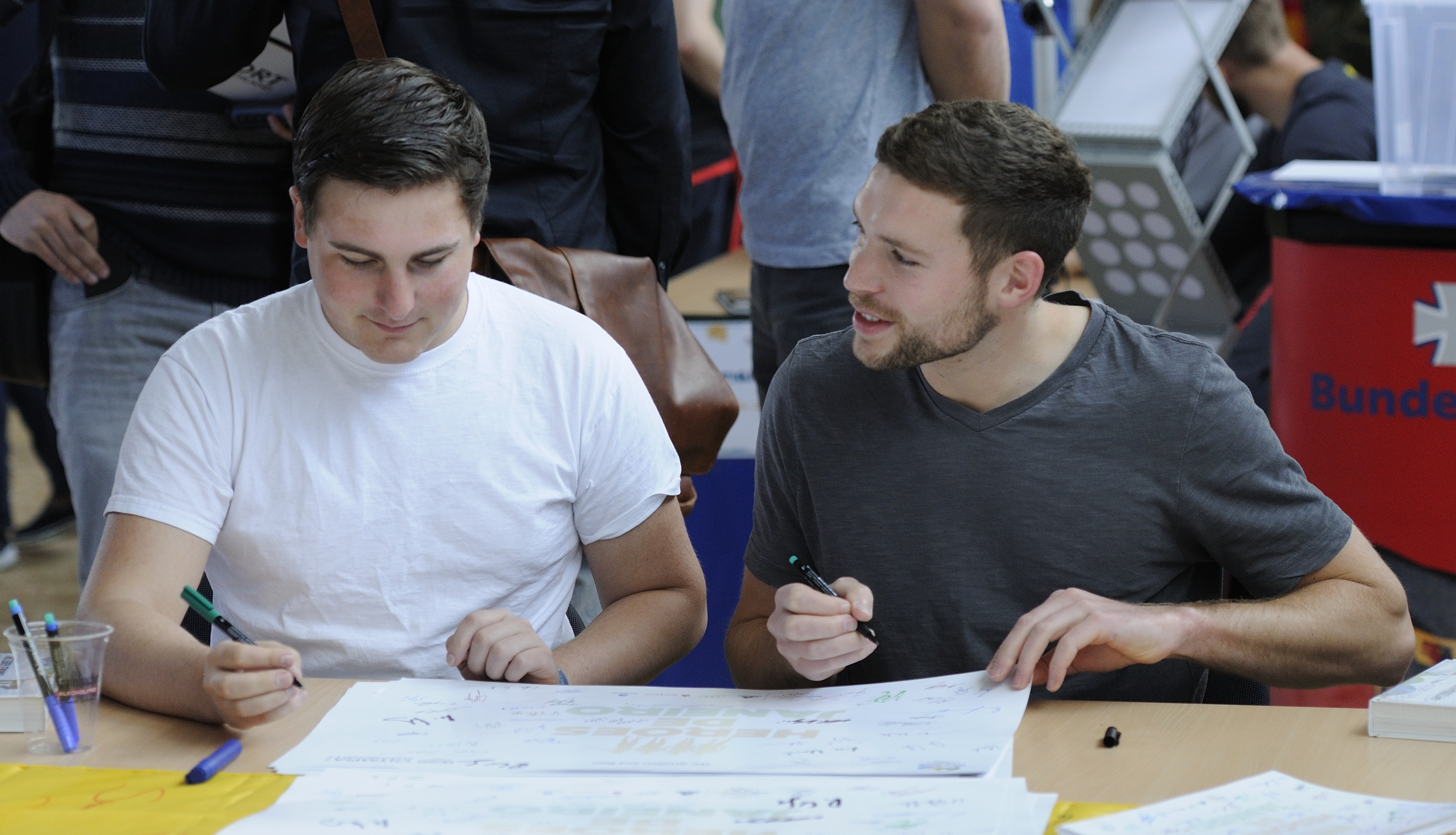 Bild aufgenommen in Hannover während der Einkleidung der deutschen Olympiamannschaft 2016. André Link und Michael Janker.